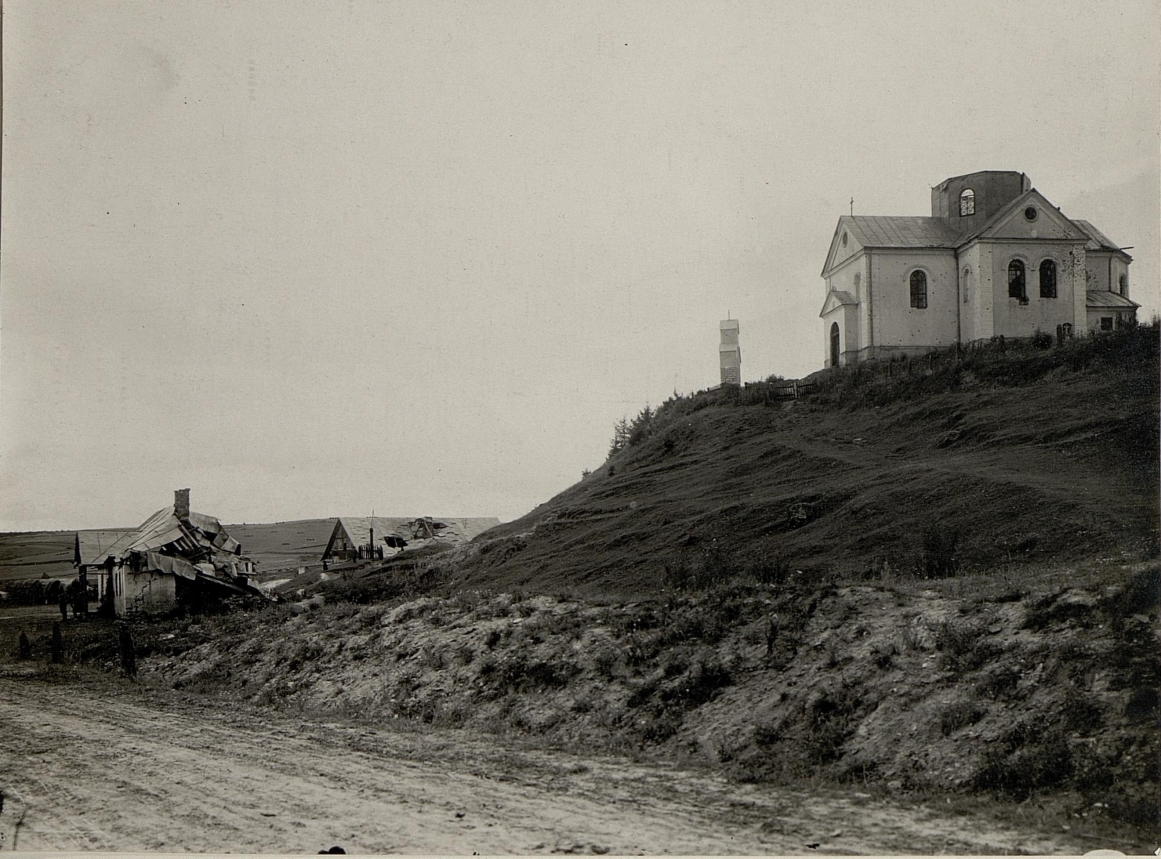 Zwei zerschossene Häuser und Kirche vor einer russischen Hauptstellung an der Zlota Lipa Chiemirzince, aufgenommen am 20.8.1916